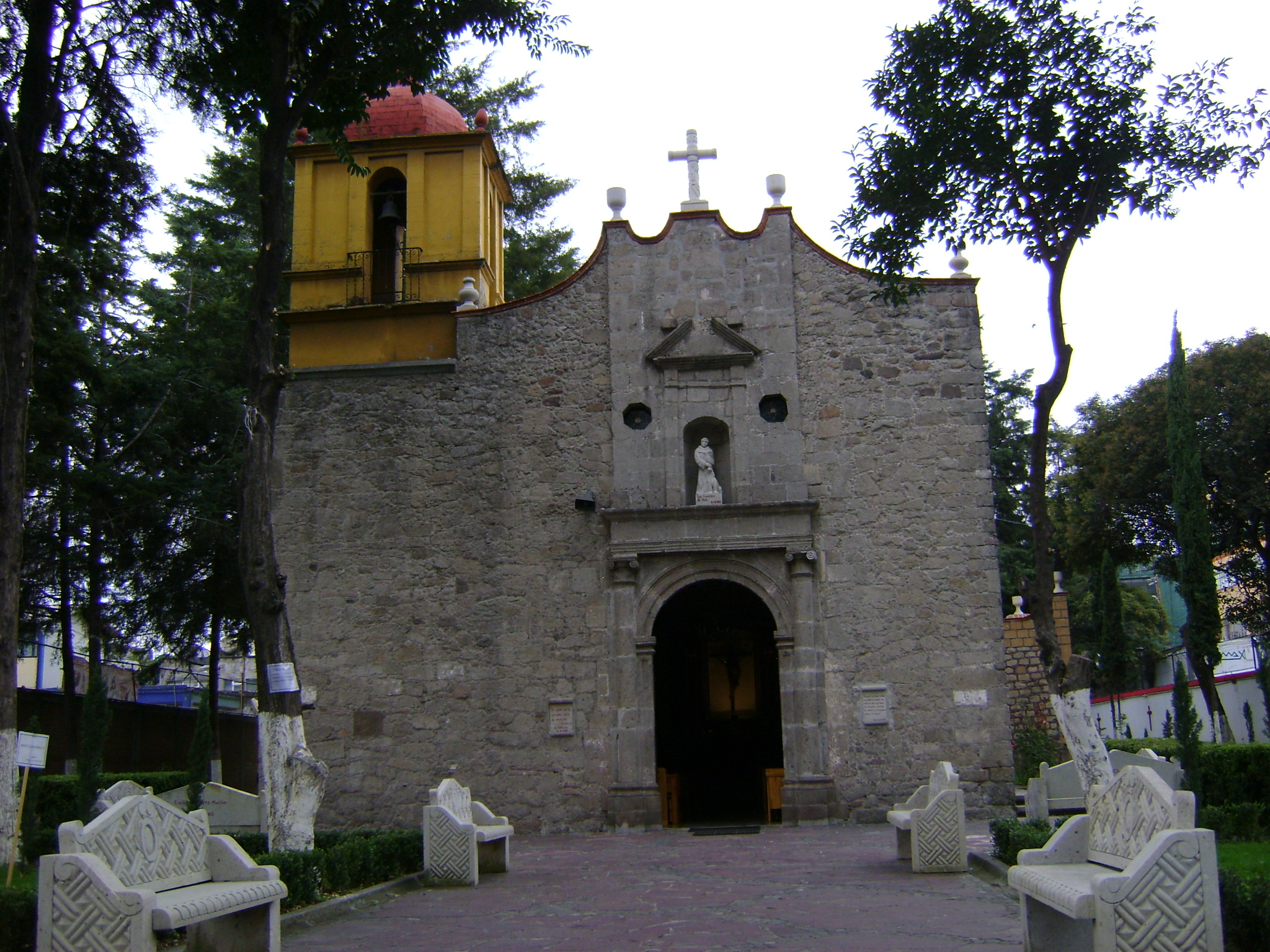 ID 04221 Templo de la Preciosa Sangre 19°29′0″N 99°13′52″O Cuauhtémoc 3, Santa María Nativitas